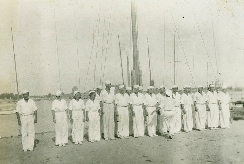 Jachtklubas, buriavimo mokyklos kursantai. Antra iš kairės stovi Elena Šikšnytė (Kruopienė, 1912–1991). Klaipėda, 1938 metai